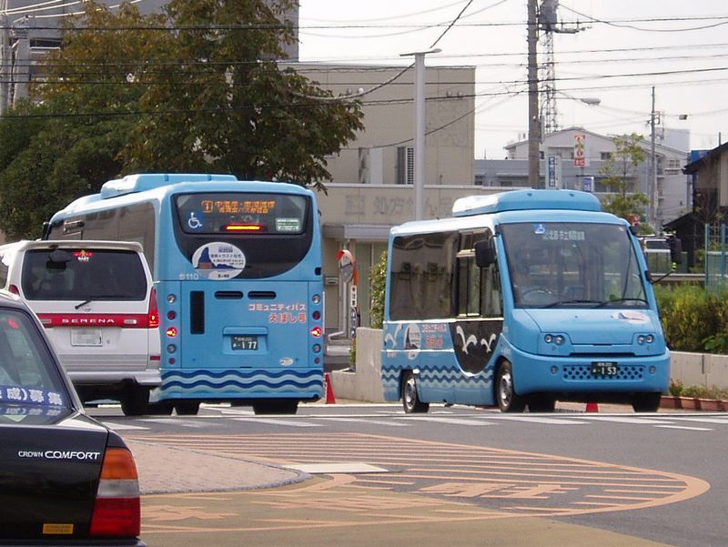 Kanachu (Left)Hino ADG-HX6JHAE (Right)Hino VF3ZCPMAC